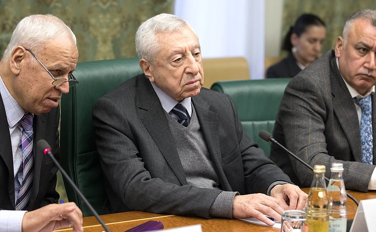 Наеф Хаватме — генеральный секретарь Демократического фронта освобождения Палестины (на фото в центре)